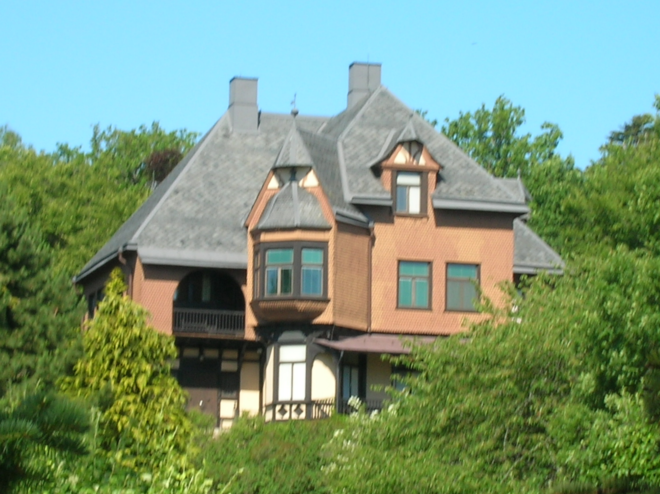 Villa Skoga i Åby Norrköpings kommun. Uppförd 1891-1894. Arkitekt Agi Lindgren. Uppförd i fornnordisk stil med korsvirke och fjällpanel med altaner, burspråk och dekorativa takkupor